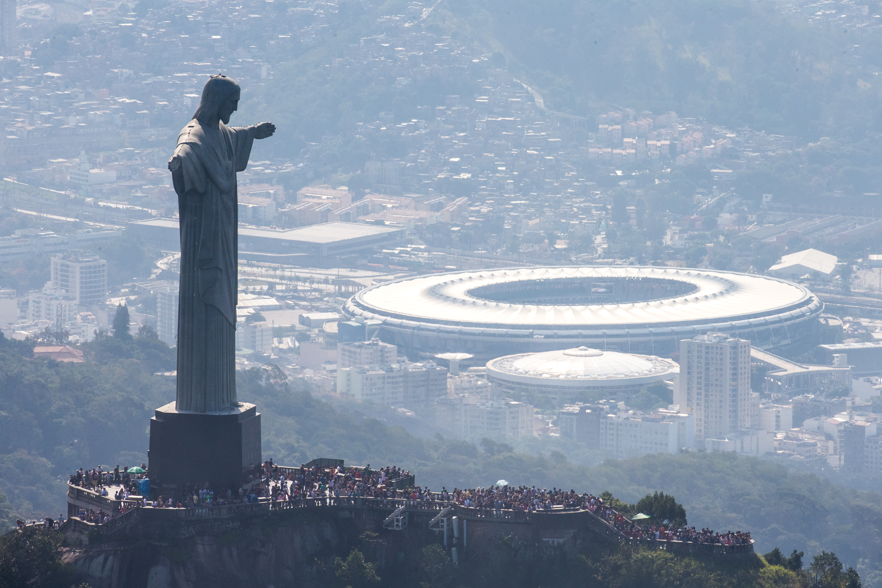 Cristo Redentor em primeiro plano e Maracanã e Maracanãzinho ao fundo